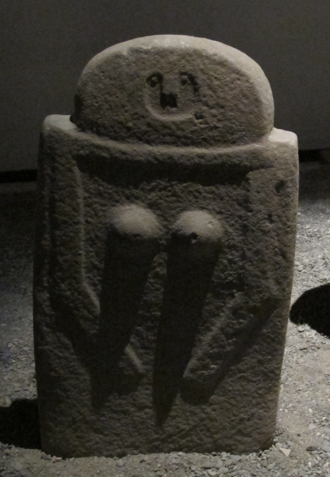 Tipo A, stele di Moncigoli I (Fivizzano)